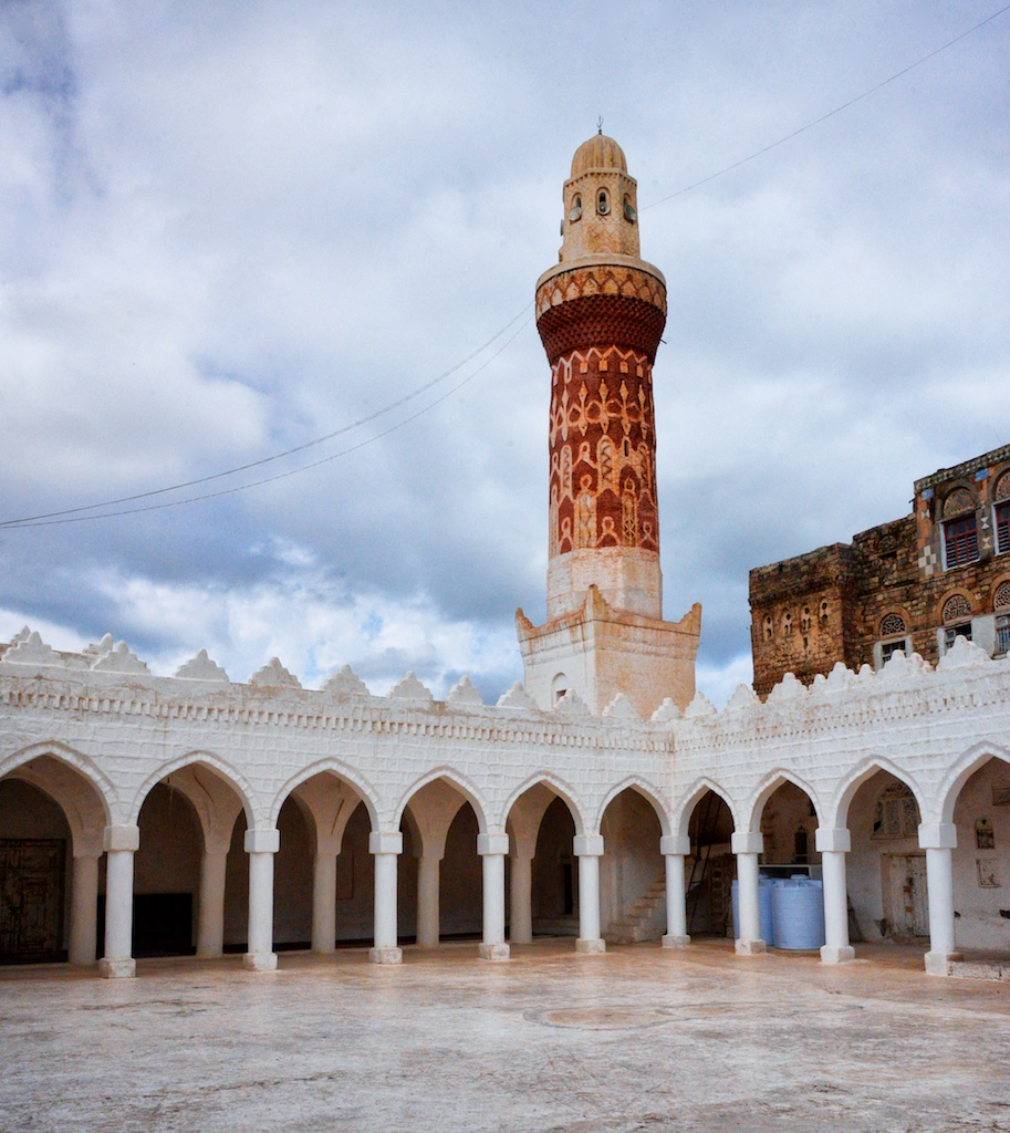 Old Mosque, Yemen